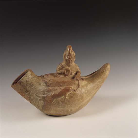 Caballito de totora. Ceramica Mochica. Museo Larco.